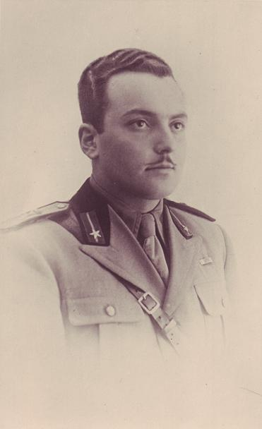 Leonardo Magnani, proprietà Magnani